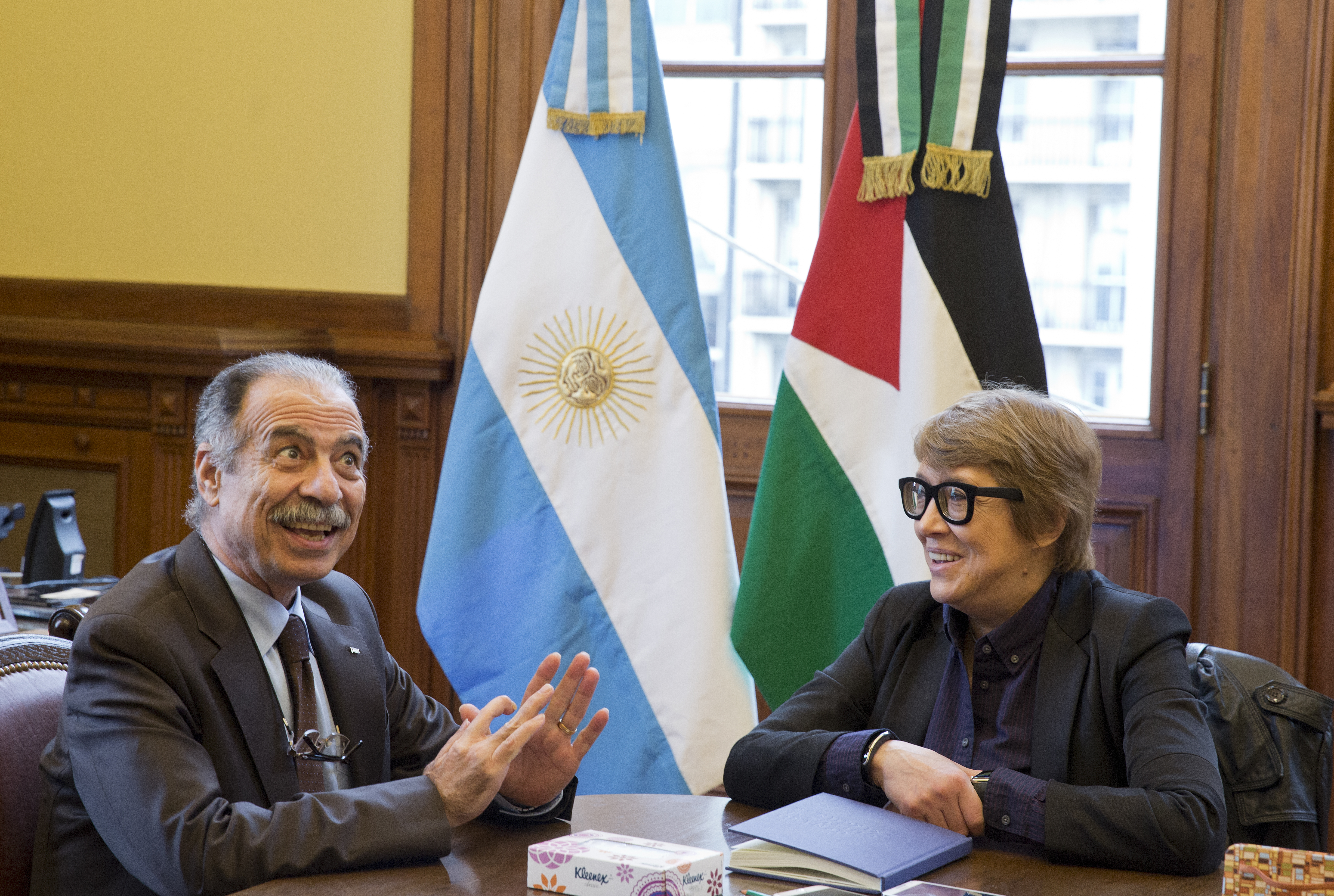 Buenos Aires, 07 de agosto de 2015 La ministra de Cultura de la Nación, Teresa Parodi, se reunió esta mañana en su despacho del Centro Cultural Kirchner, con el embajador de Palestina en la Argentina, Husni Abdel Wahed. Acompañó a Parodi la directora de Política Cultural y Cooperación Internacional, Mónica Guariglio. Fotos: Silvina Frydlewsky / Ministerio de Cultura de la Nación